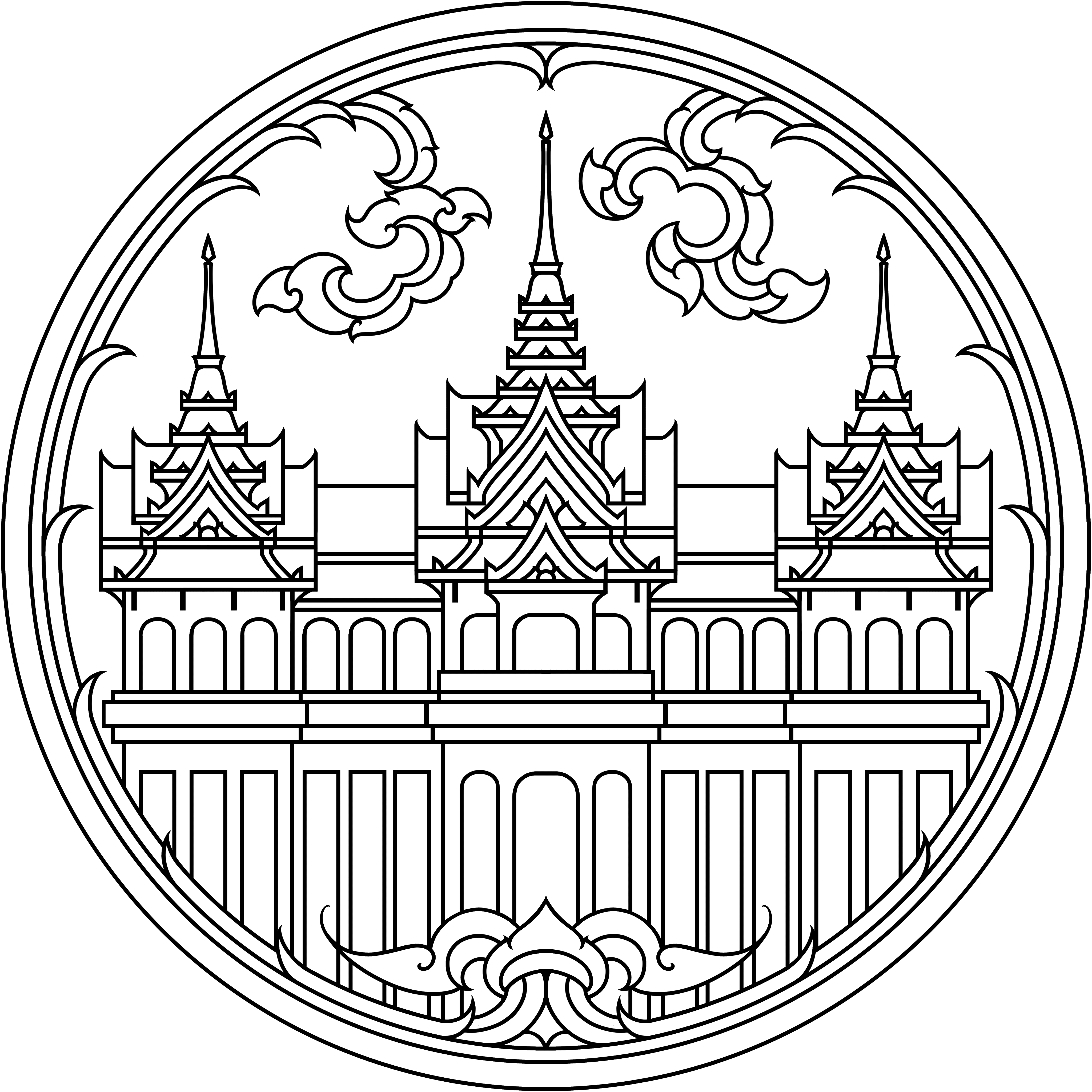 ตราประจำจังหวัดพระนคร ภาพจากหนังสือตราประจำจังหวัด กรมศิลปากรจัดพิมพ์ พ.ศ. 2542